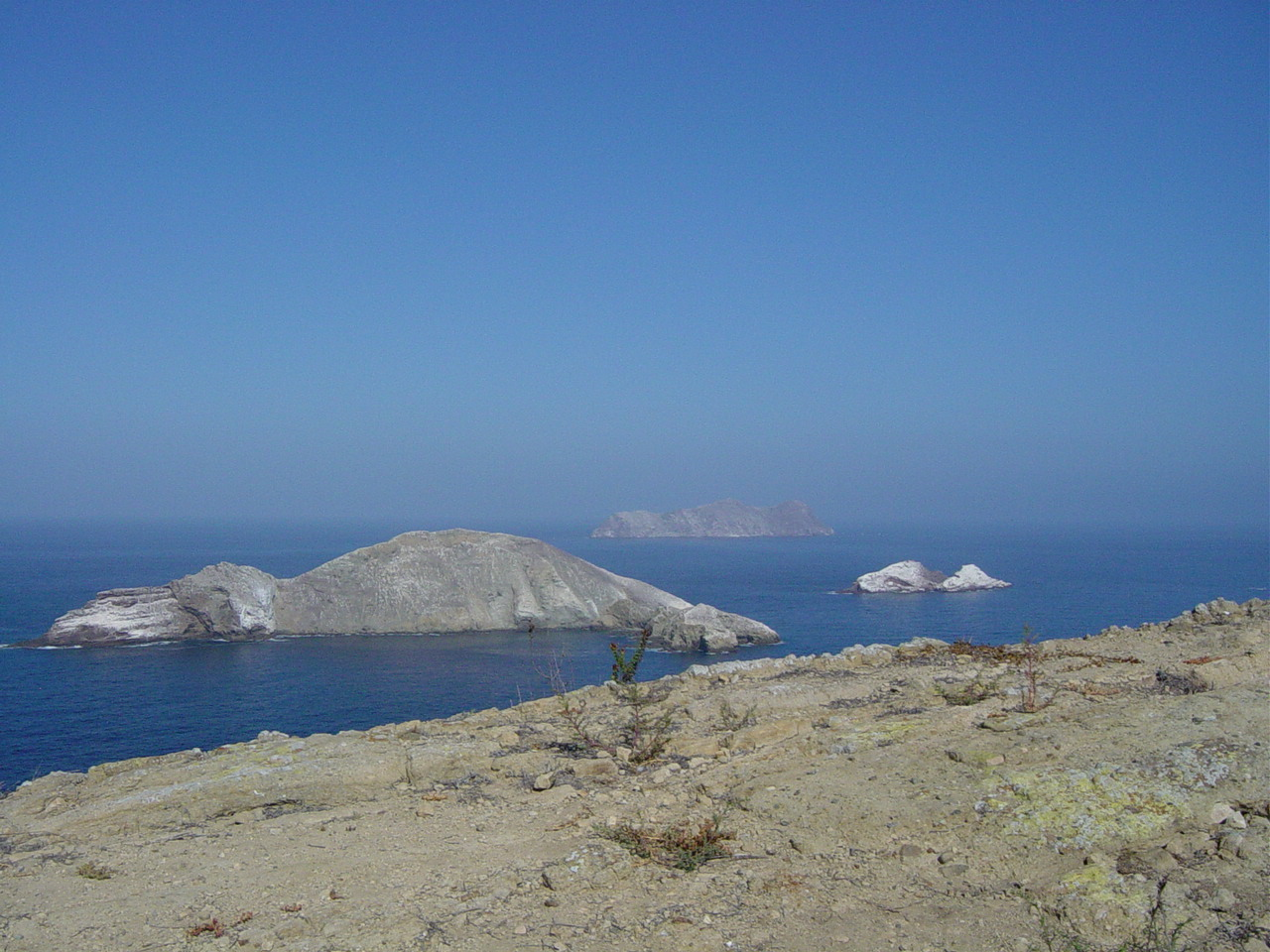 Toma desde la Isla Coronado sur, a la izquierda la Isla Coronado centro, le sigue el islote Pilón de Azúcar y al fondo la Isla Coronado norte.